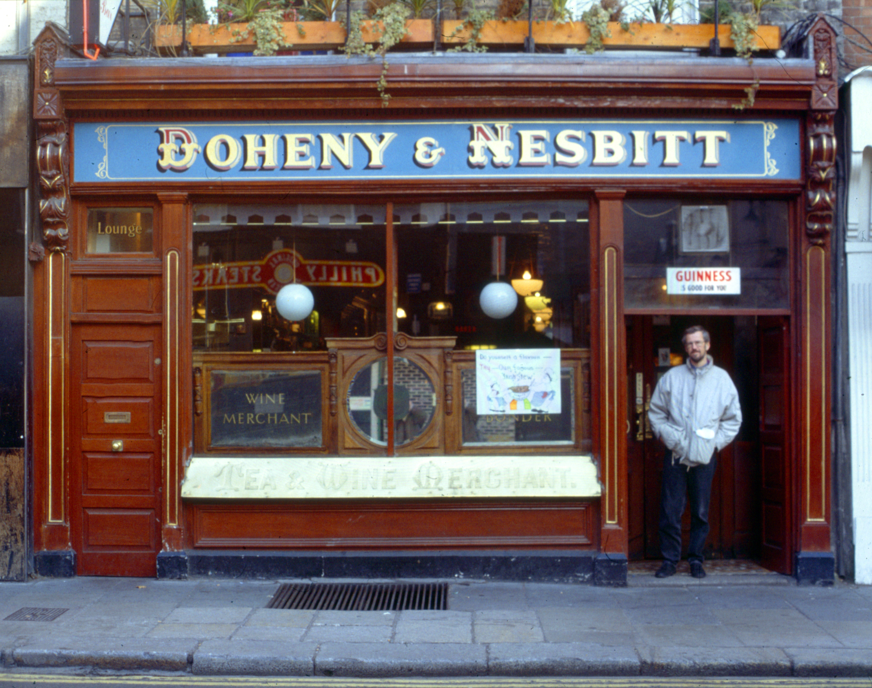 1993 in Dublin